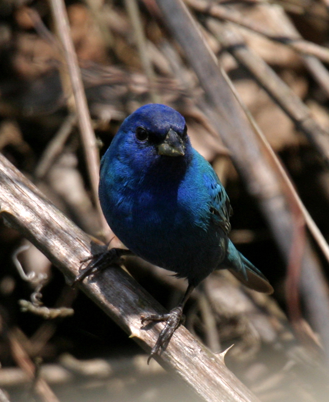 An Indigo Bunting in West Tennessee.